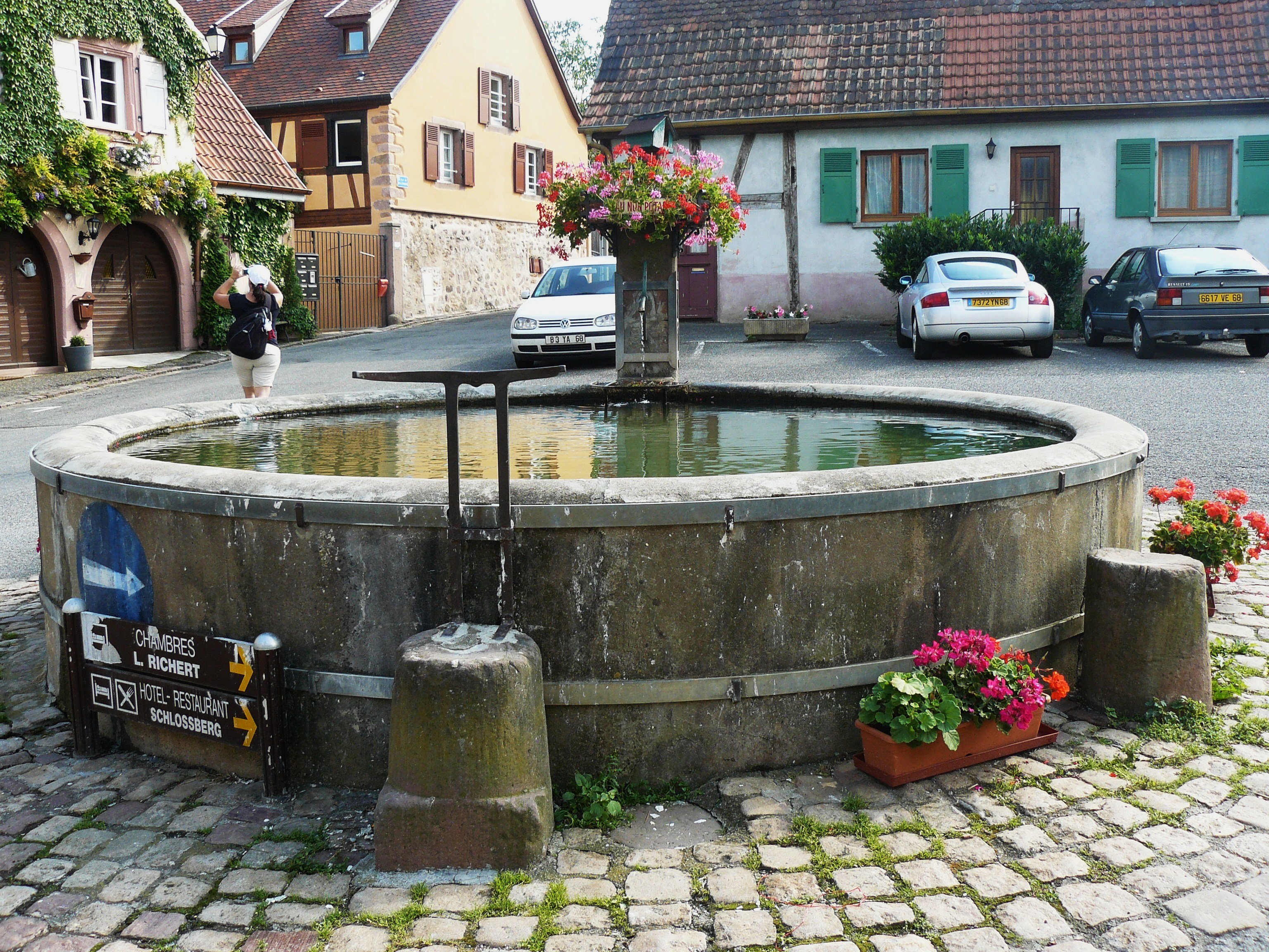 Ancienne fontaine du XIXe siècle, Place du 19 décembre 1944